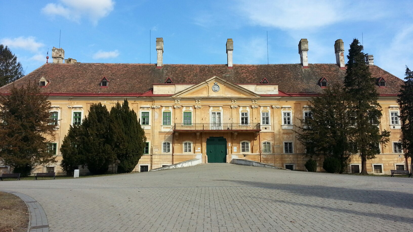 Kaštieľ v Zámockom Parku v Malackách